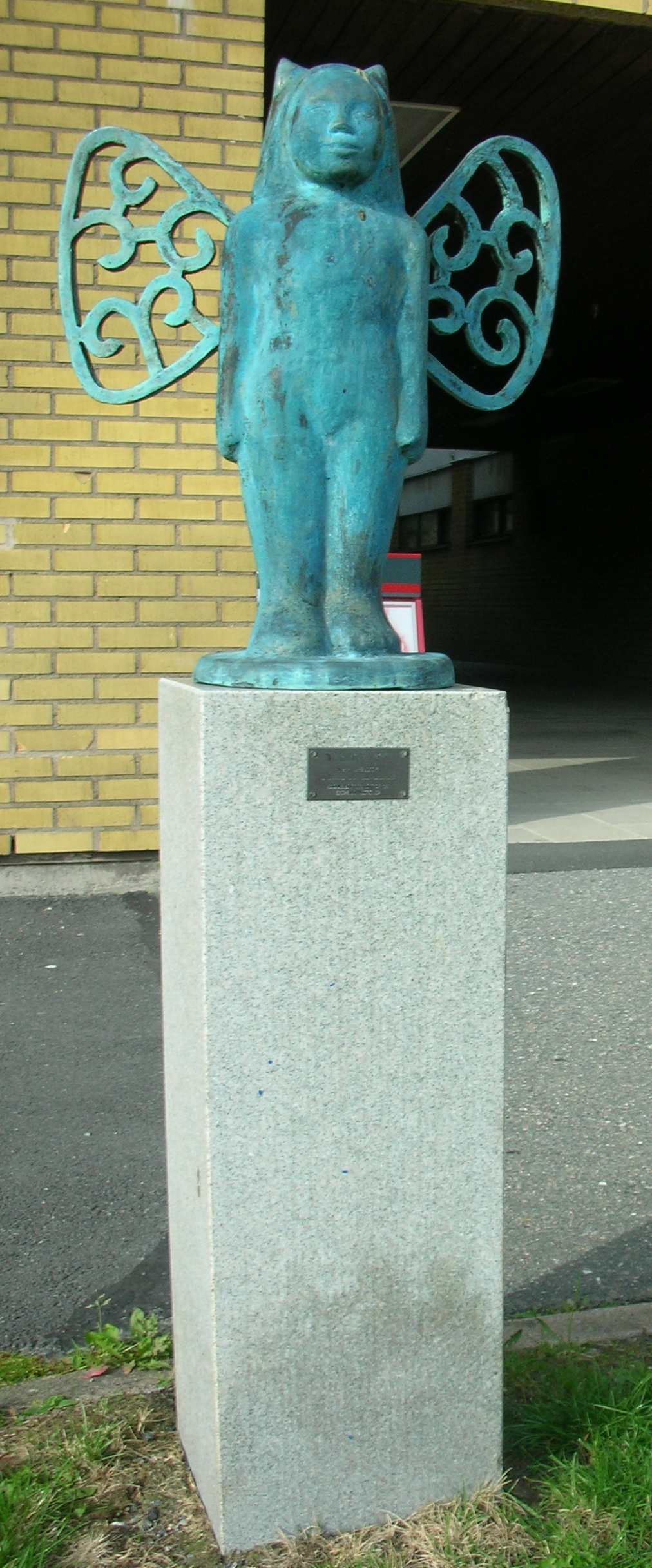 Statyn KattFlickaFjäril av konstnären Petra Borén. Skapad år 2000.